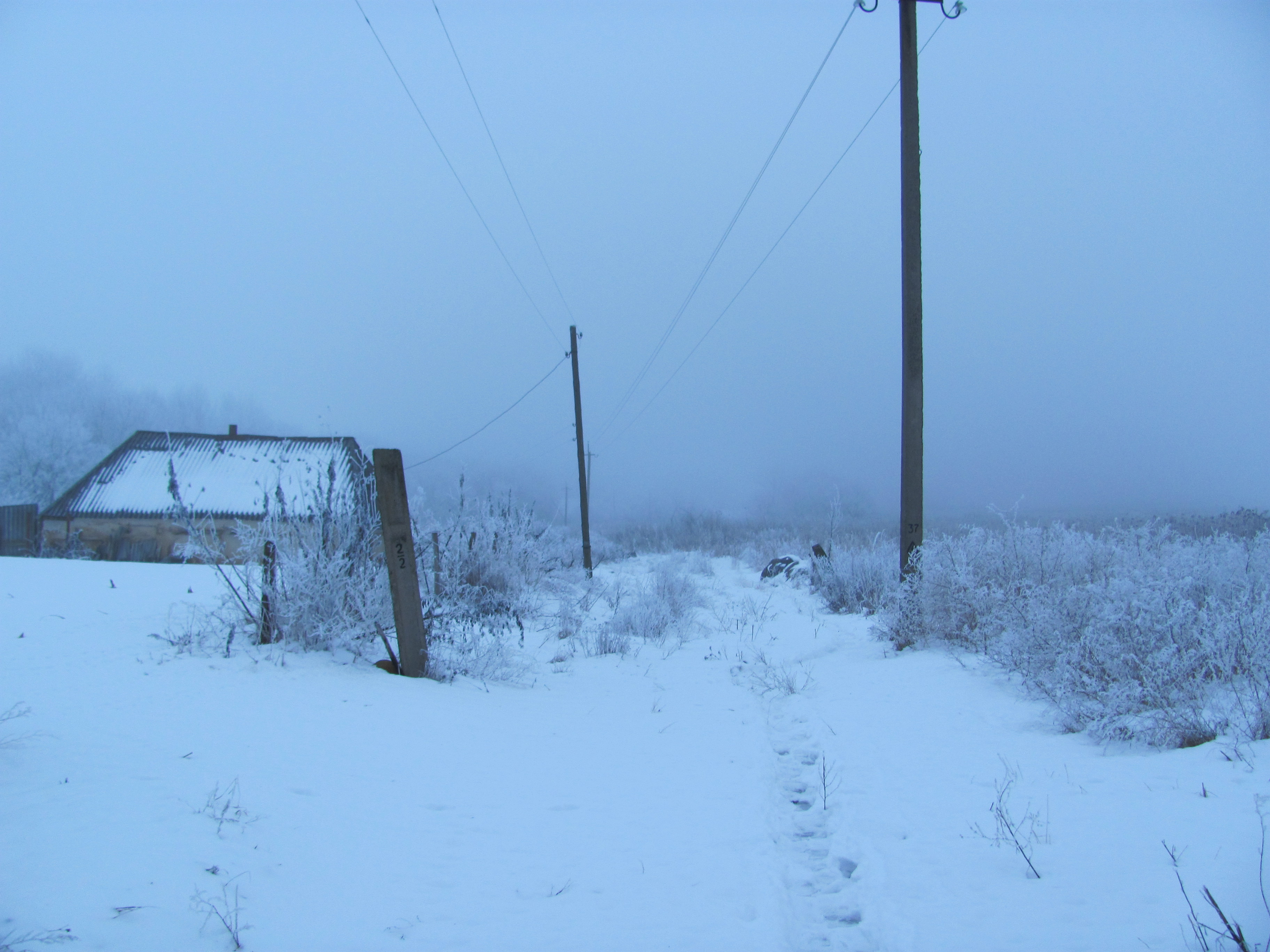 Одна з перших вулиць села - нині, початок вулиці Колгоспна. Ще 40 років назад тут по обидва боки стояли хати, тепер людські огороди.